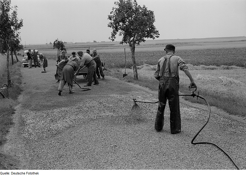 Original image description from the Deutsche Fotothek Straßenbau. Aufbringen einer Straßendecke